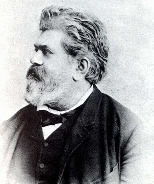 Csiky Gergely (1842–1891)